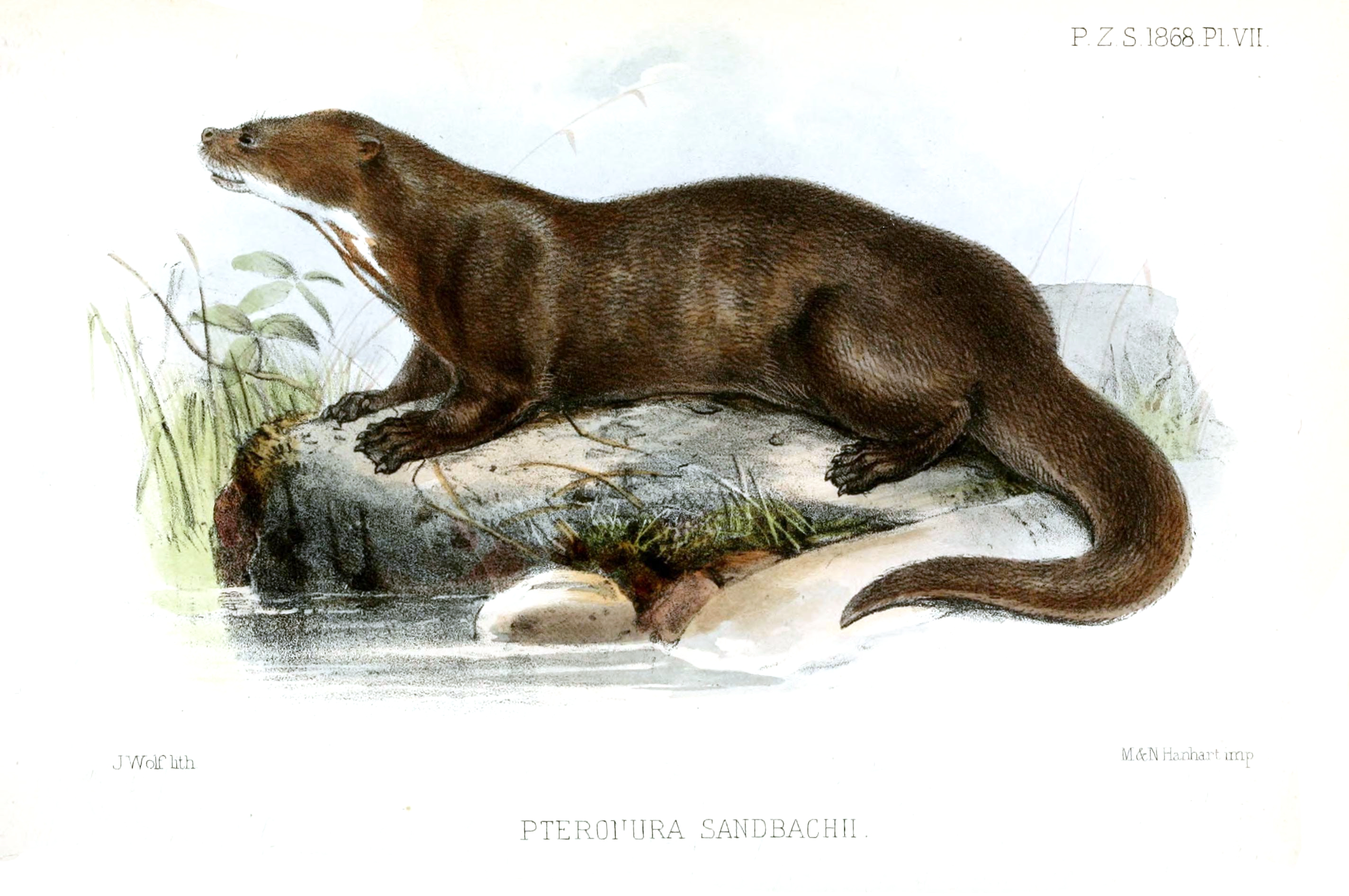 Pteronura sandbachii = P. brasiliensis